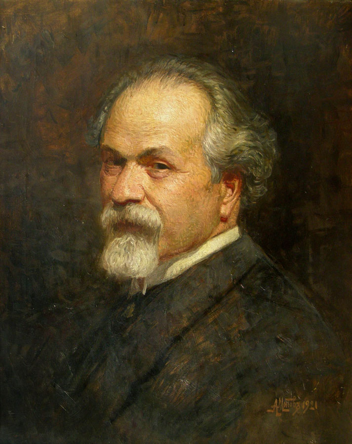 Автопортрет. Антон Стефанов Митов (1862-1930) — болгарский художник